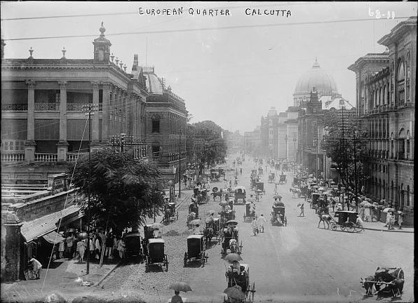 European Quarter, Calcutta, India